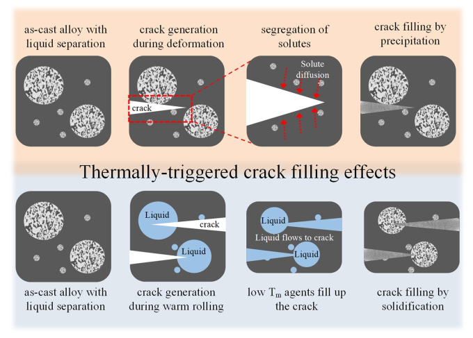 Schematic illustration of the thermally-triggered crack filling and dual self-healing effects proposed form this work